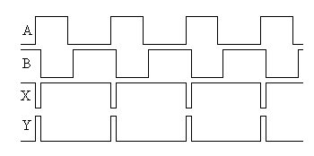 Oszillogramme des Impulsgenerators